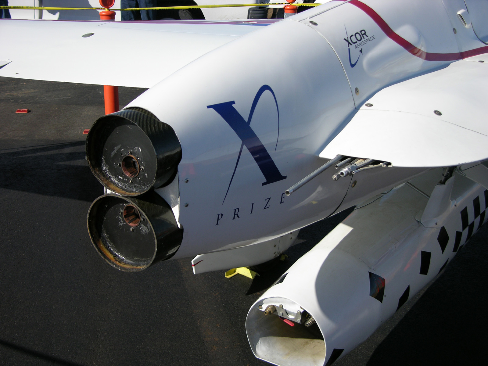 XCOR EZ-Rocket twin rocket engines